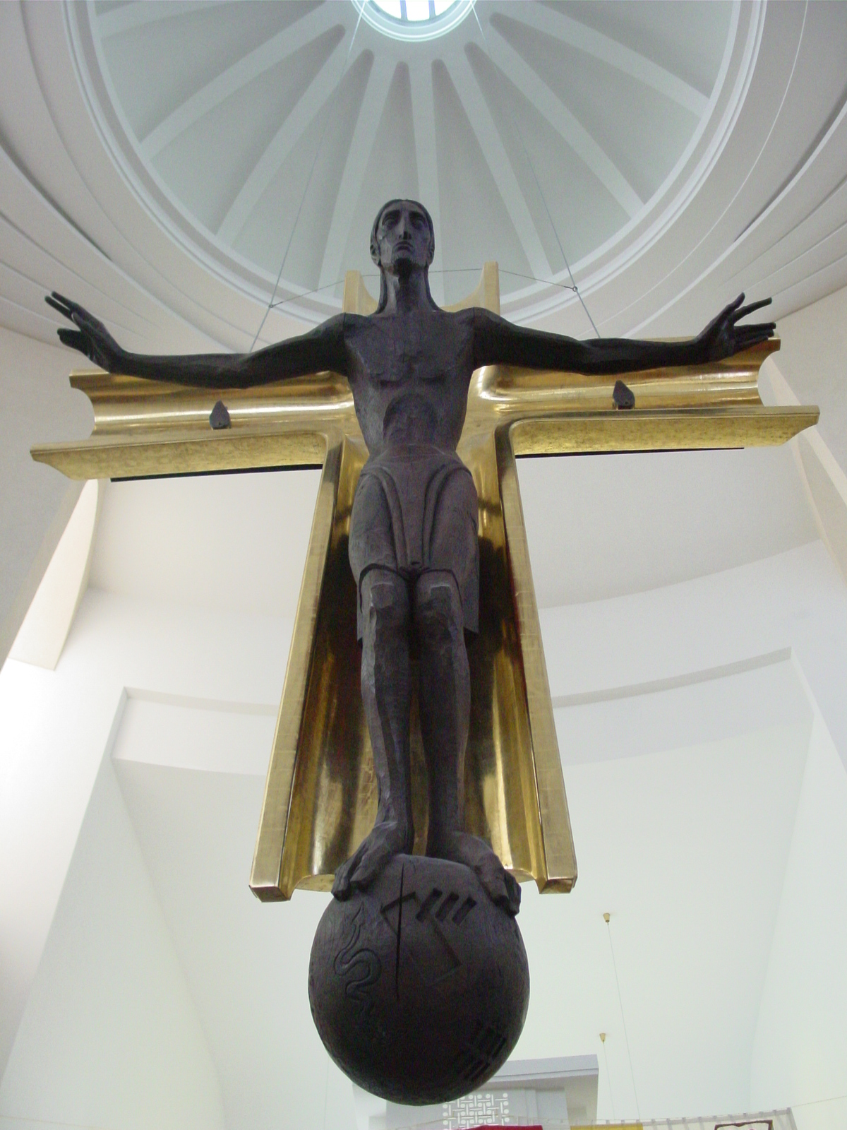 Kreuz über dem Hochaltar in der Pfarrkirche Liesing in Wien 23 Bild von mir selbst aufgenommen, Frühjahr 2006